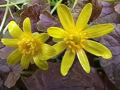 Ranunculus ficaria 'Brazen Hussey'